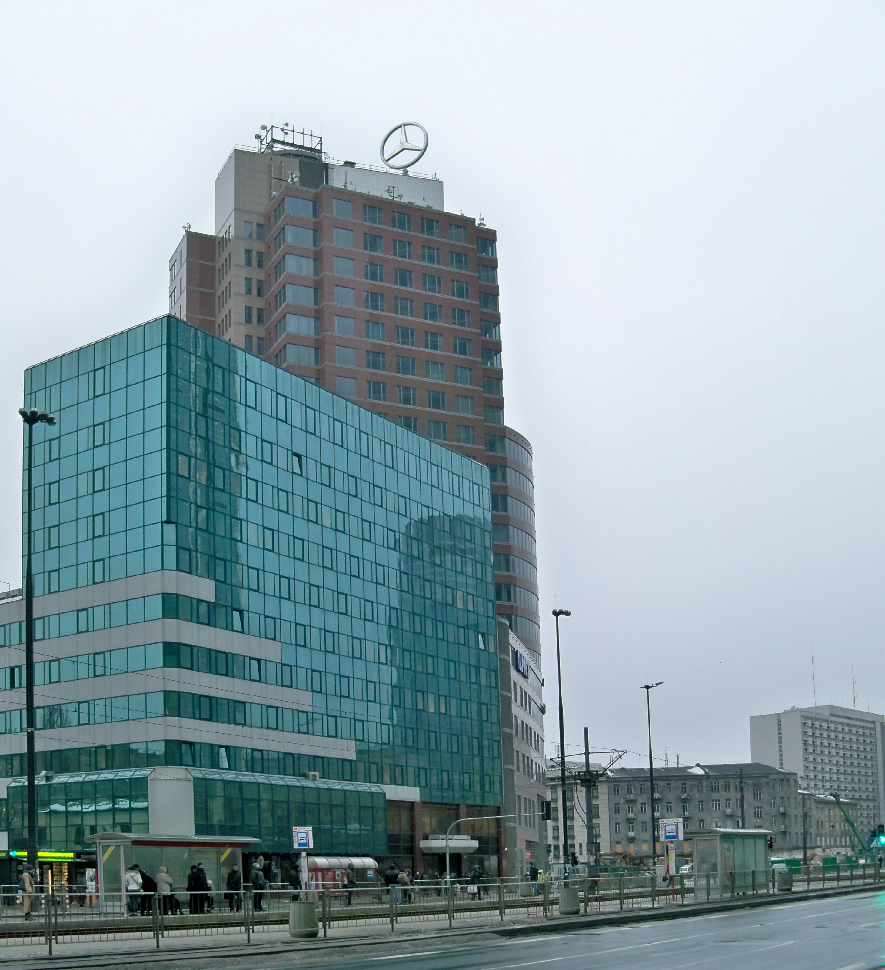 Na pierwszym planie biurowiec PFRON, al. Jana Pawła II 13 w Warszawie, za nim wieżowiec Ilmet. W głębi Rondo ONZ.